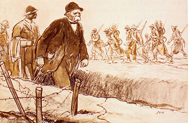 Georges Clemenceau visitant le front.